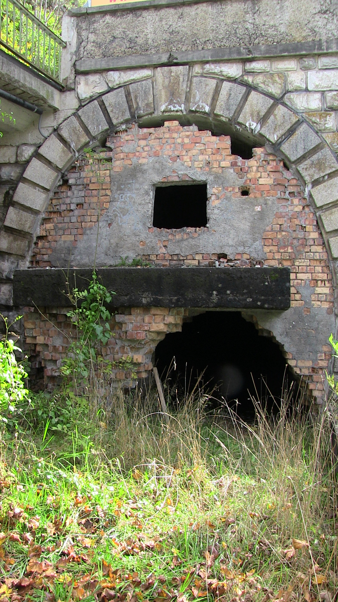 Tunnelportal der Reschenbahn